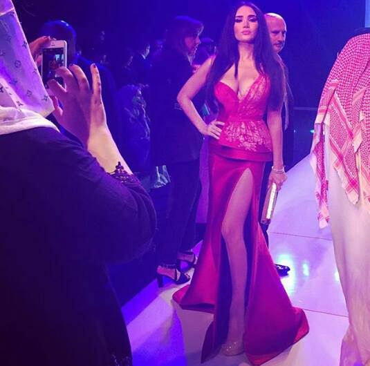 ميليسا في دبي في أسبوع الموضة العربي 2015